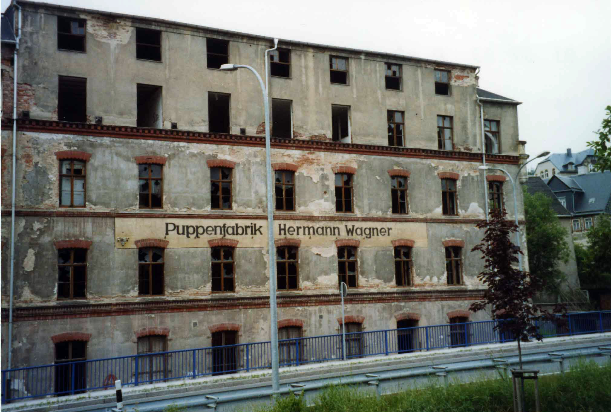 ehemaliges Gebäude der Puppenfabrik in der Oscar-Mehlhornstraße in Schneeberg